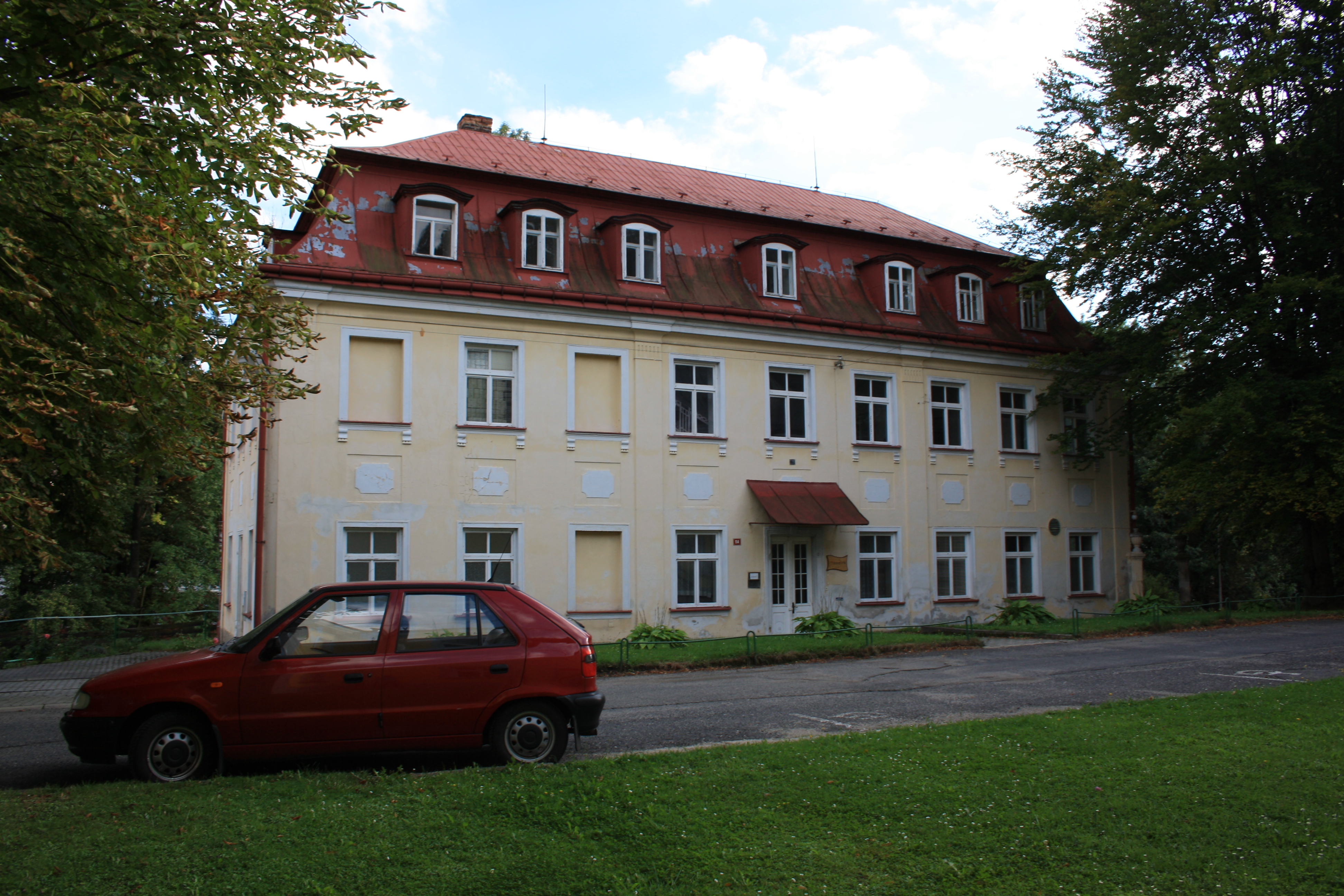 Zámeček v Lázních Libverdě, čp. 114 (pohled od severu).